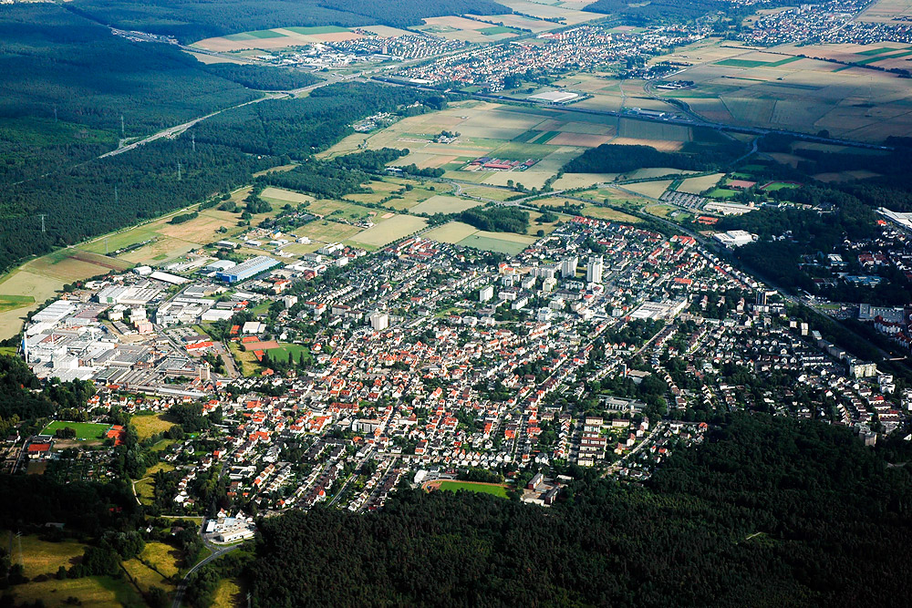 Obertshausen from air